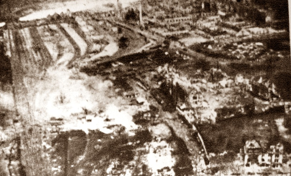 południowe przedpole Cytadeli podczas likwidacji punktów oporu Niemców przy ul. Na Podgórniku i Oficerskiej